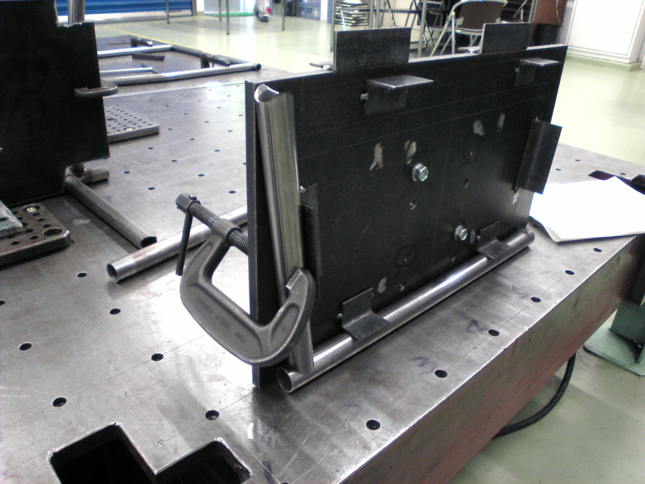 治具